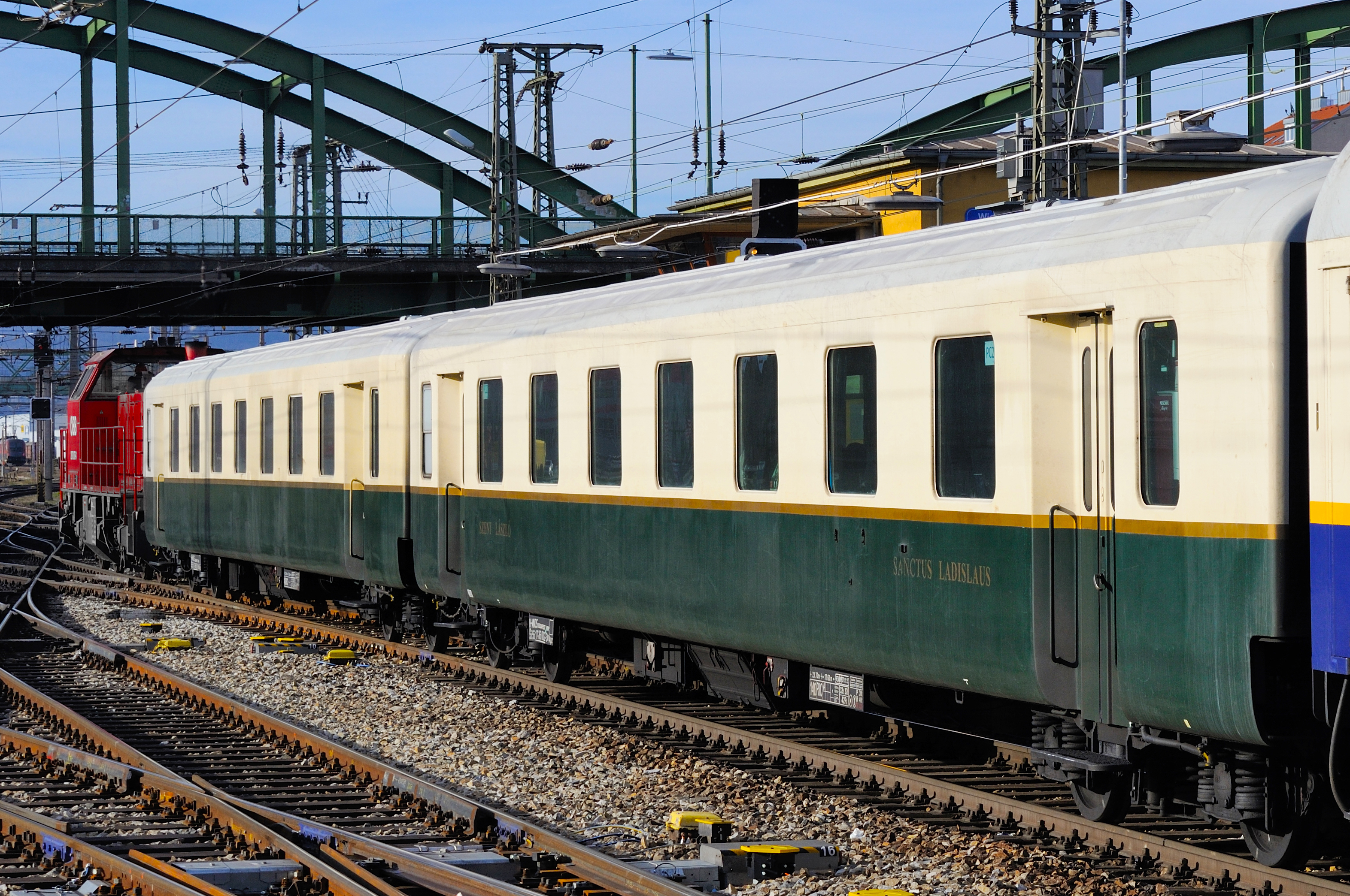 Schlierenwagen 55 55 17-36 002-3 (ex ÖBB 17-35 012) der MÁV-Nosztalgia am Wiener Westbahnhof.